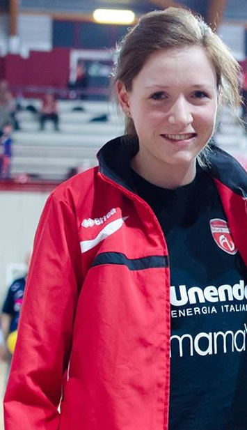 Pallavolista olandese, gioca nel ruolo di schiacciatrice ed opposto